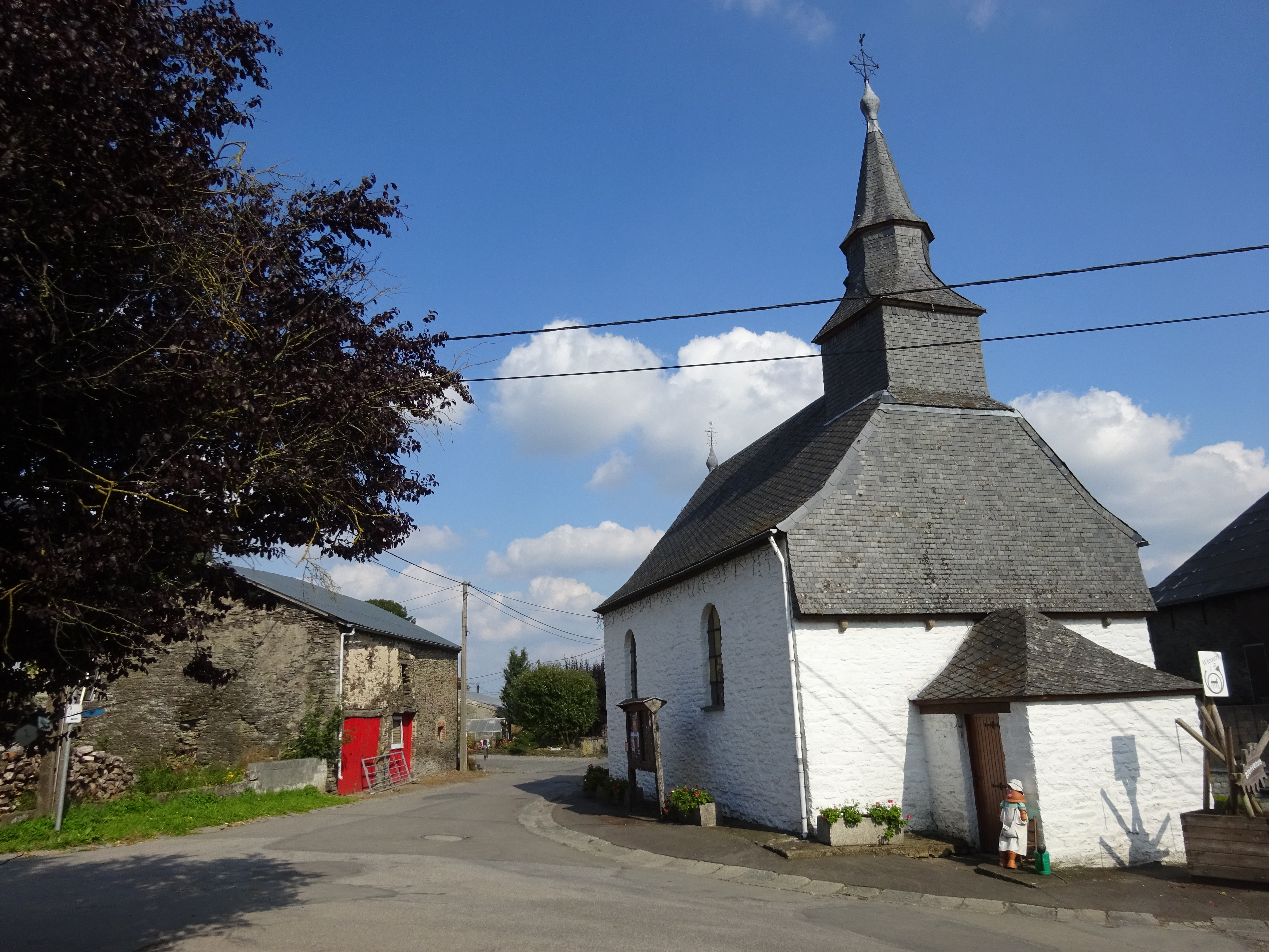 Wicourt (Bastogne)